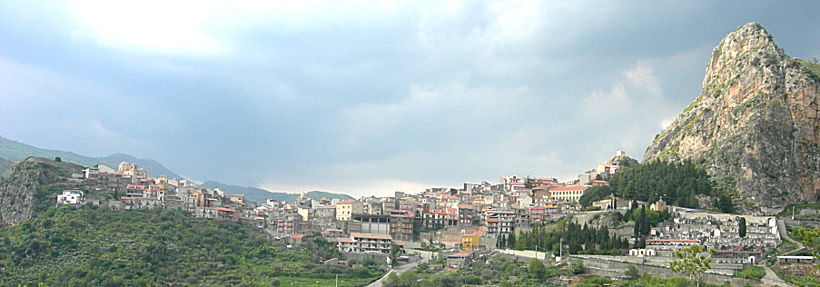 Veduta di Roccella Valdemone (Messina).